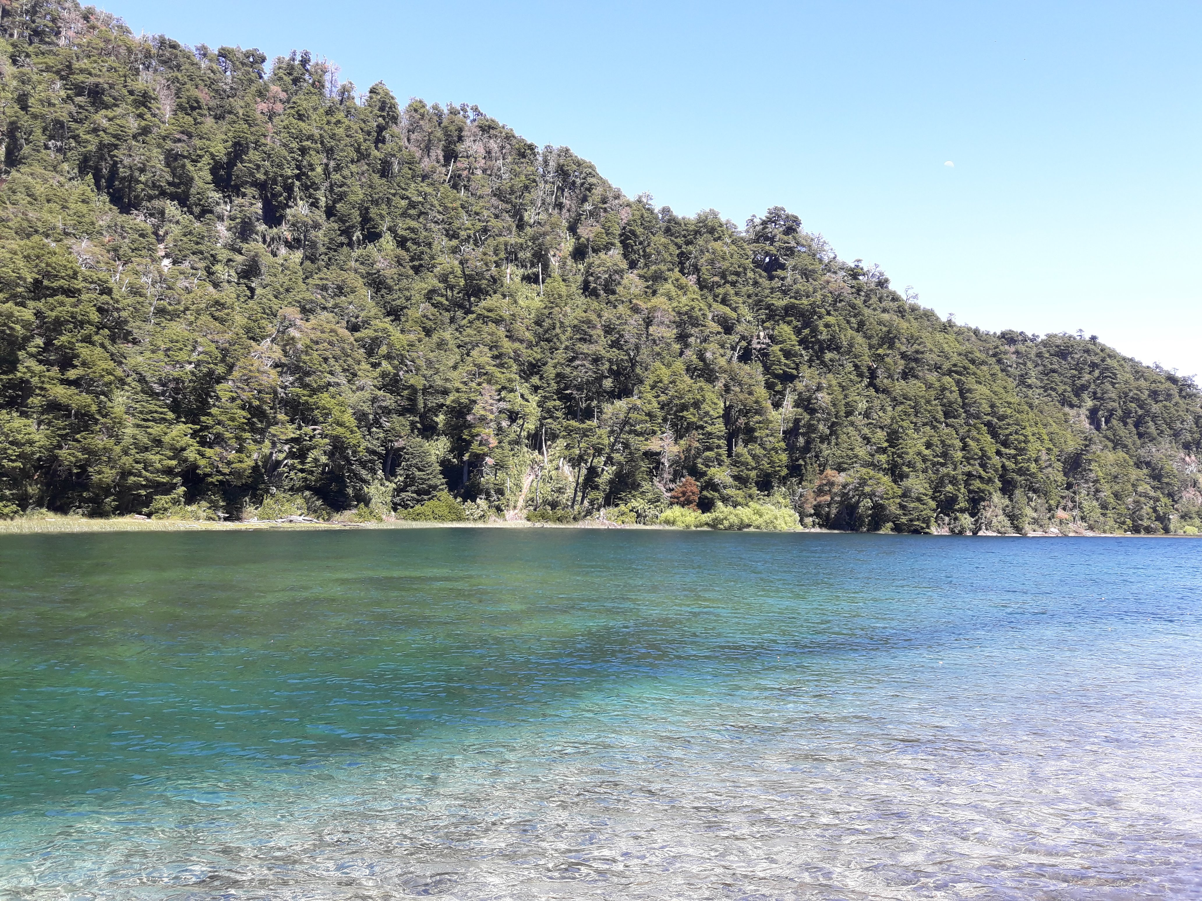 Fotografía tomada en el Lago Espejo Chico, Neuquen, Argentina